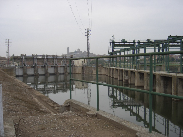 Comportes al riu Segre que marquen l'inici del Canal de Seros a la localitat de Lleida, (Catalonia/Spain).